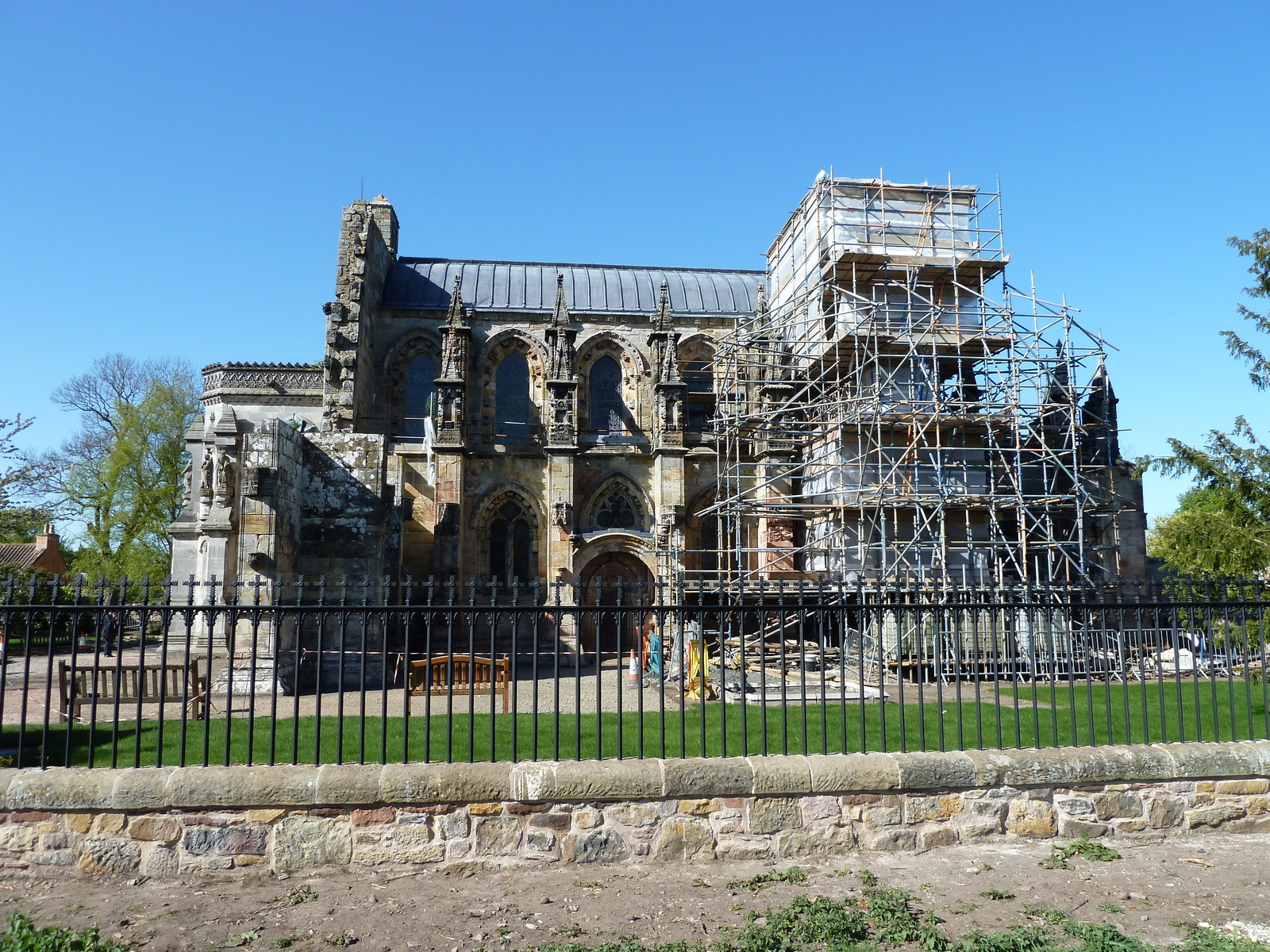 Felújítás alatt (Under reconstruction)